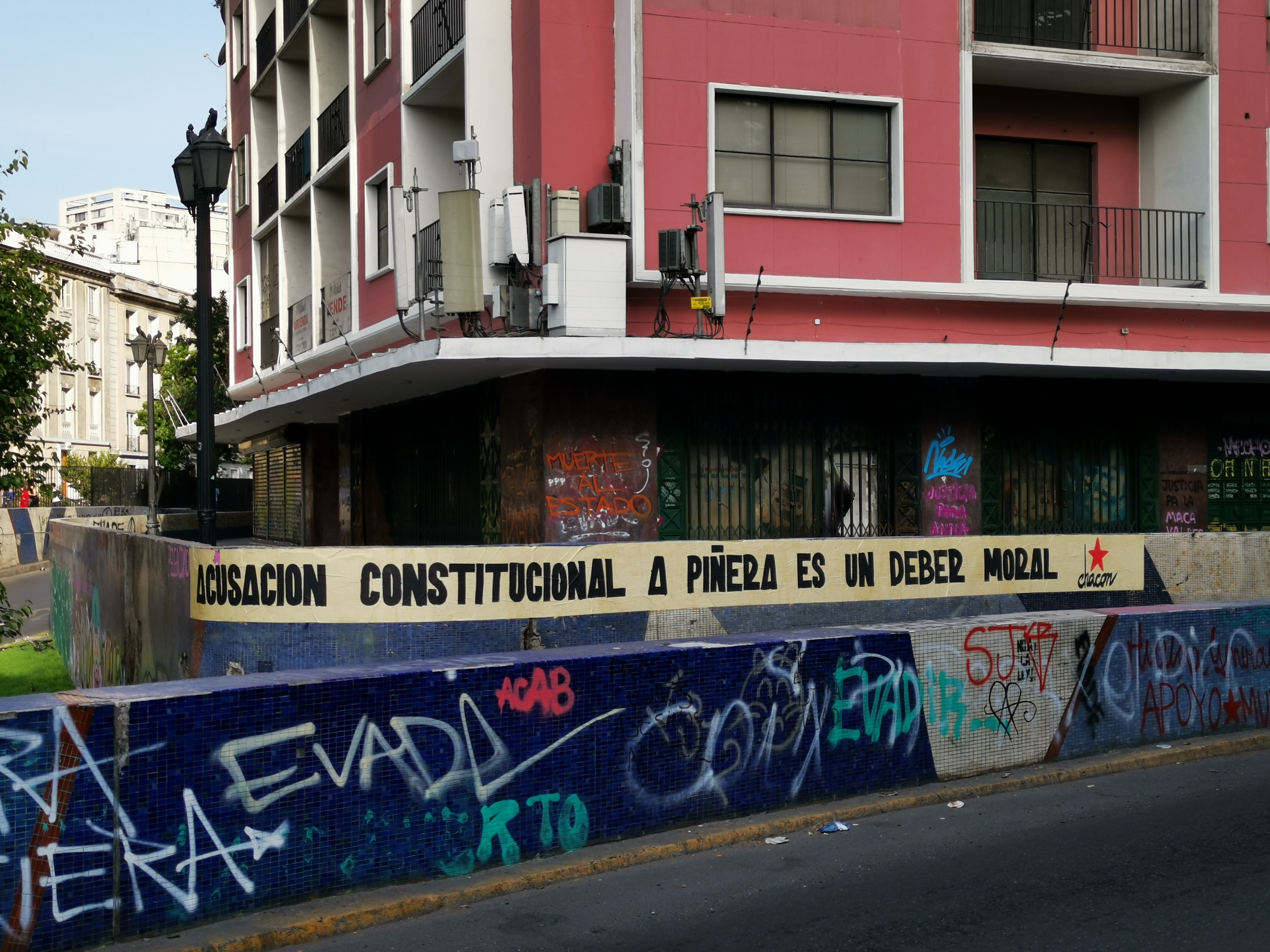 Póster a favor de una acusación constitucional contra Sebastián Piñera, durante las protestas de noviembre de 2019 en Santiago.